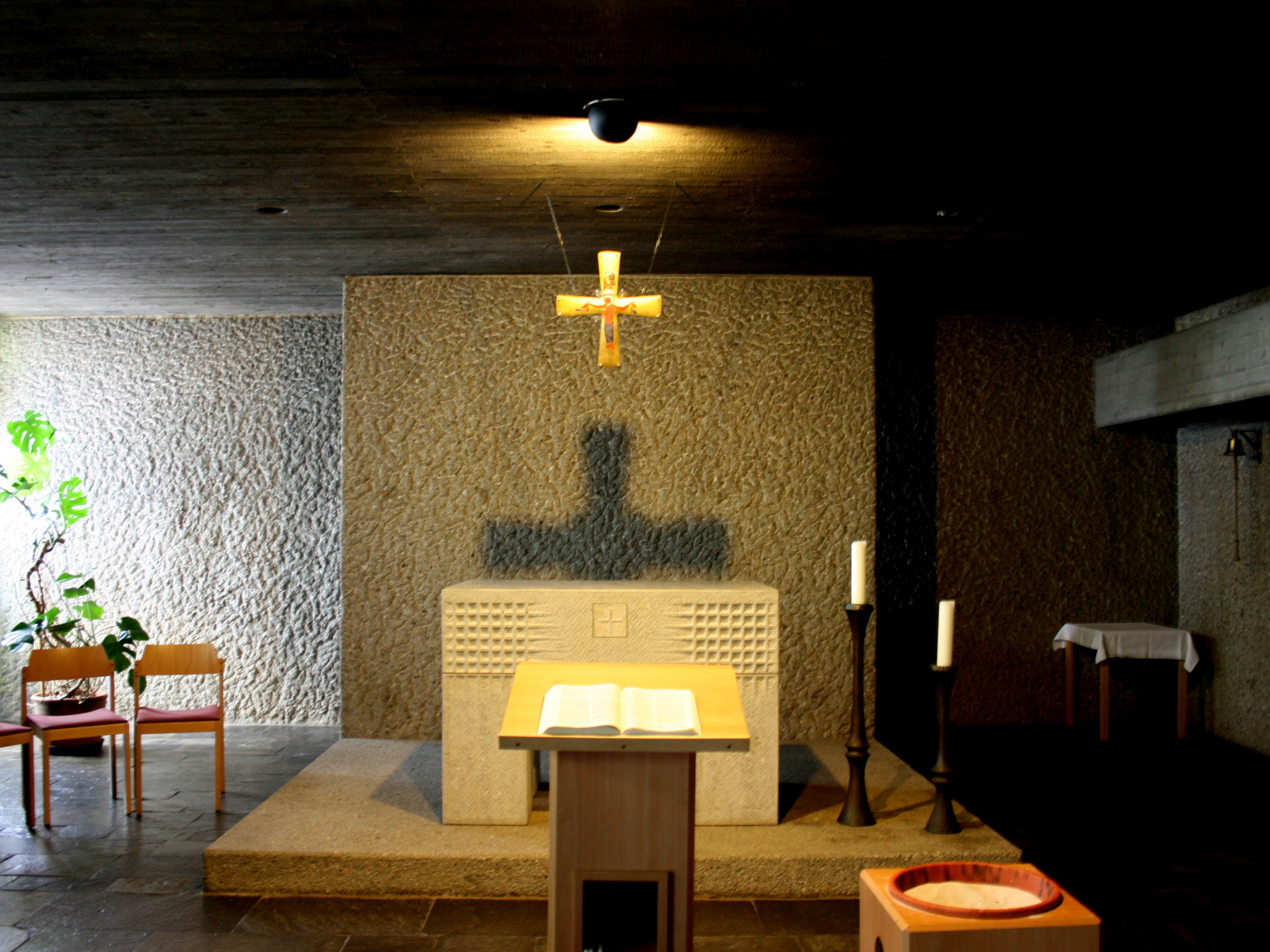 Unterkirche Sankt Joseph in Wuppertal-Ronsdorf